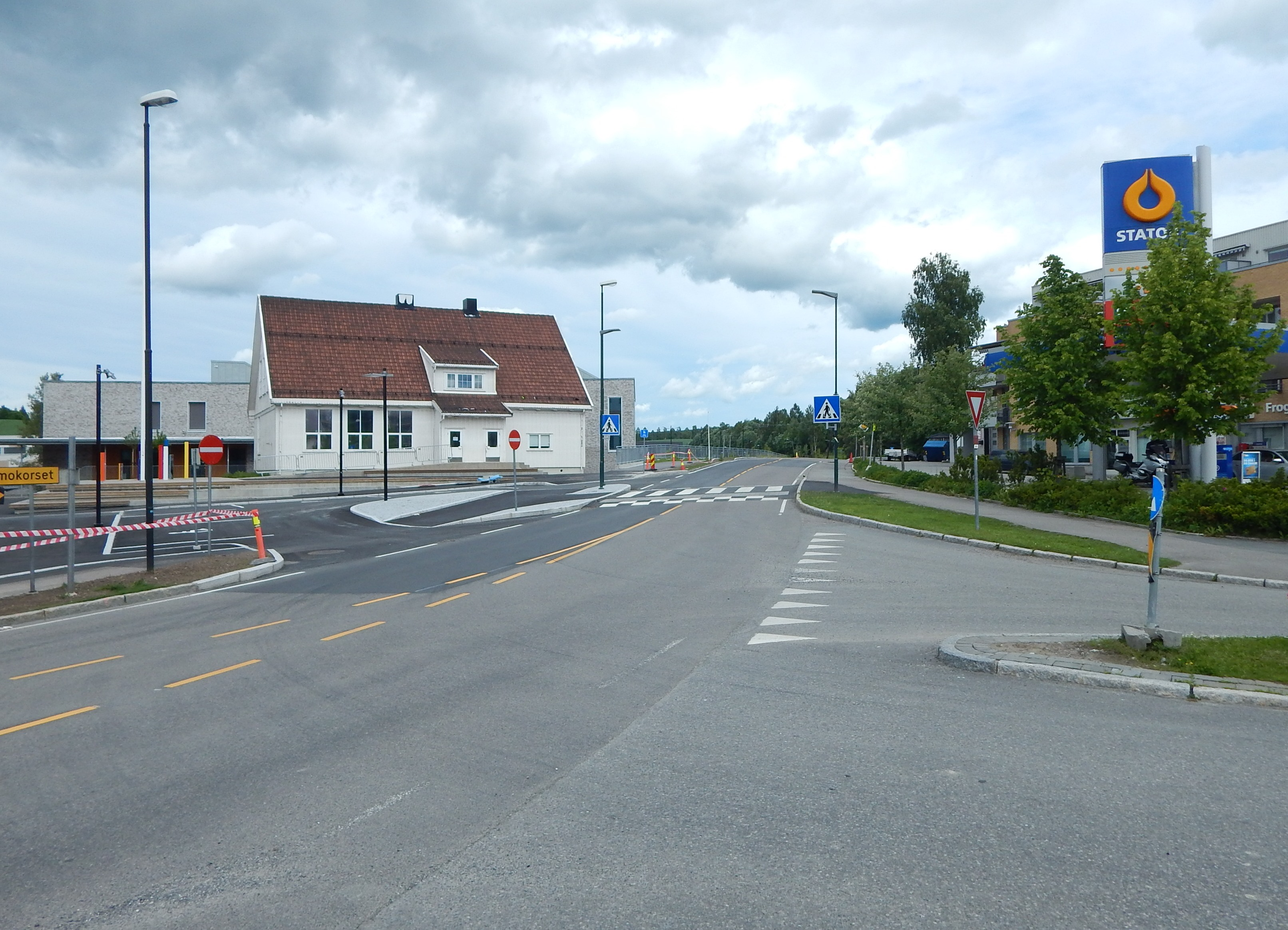 Fylkesvei 260 i Frogner sentrum